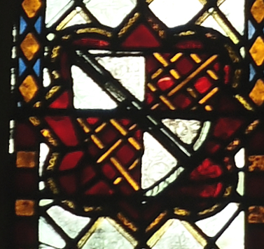 Despencer arms - Tewkesbury Abbey